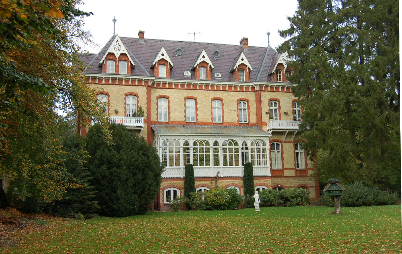 Rückseite des Schloss Düneck in Moorrege